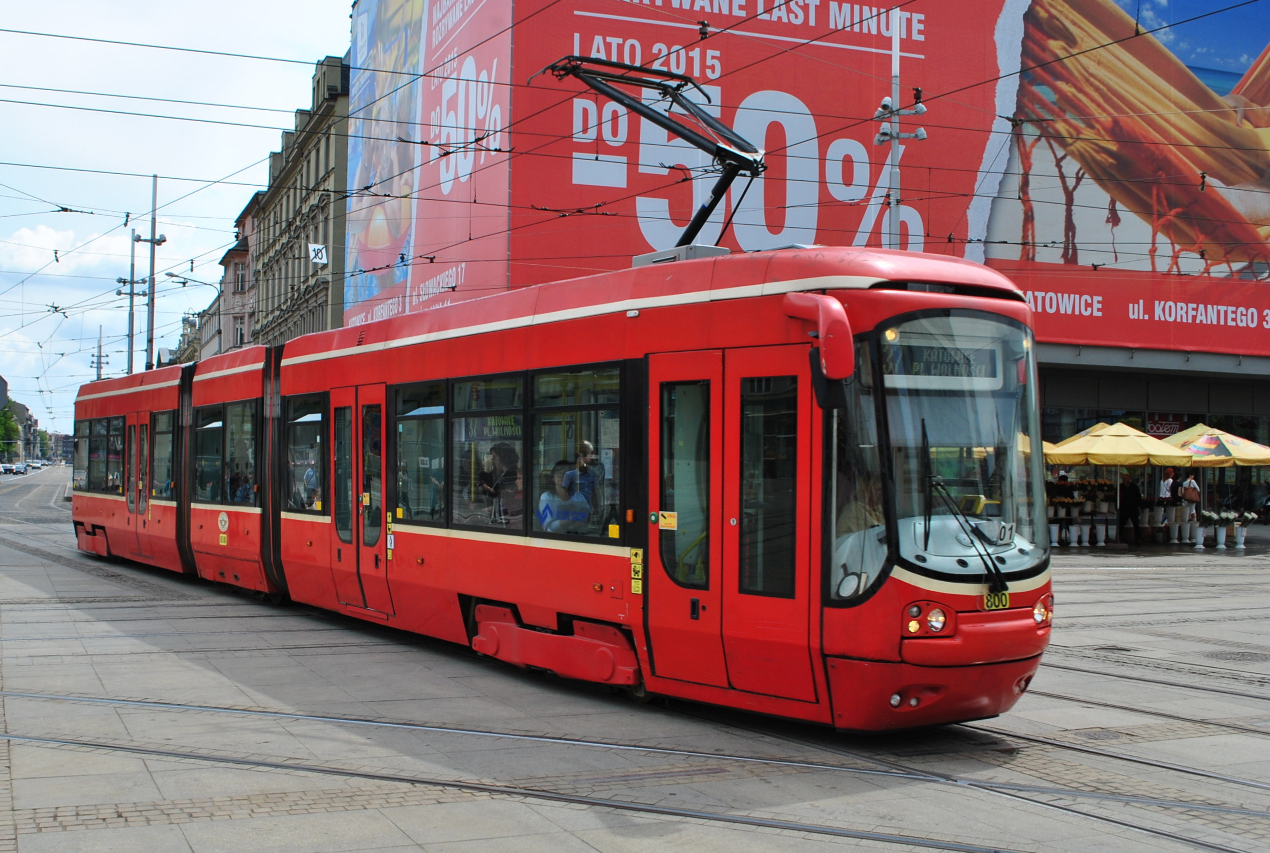 Alstom Citadis 100 #800 na Rynku w Katowicach